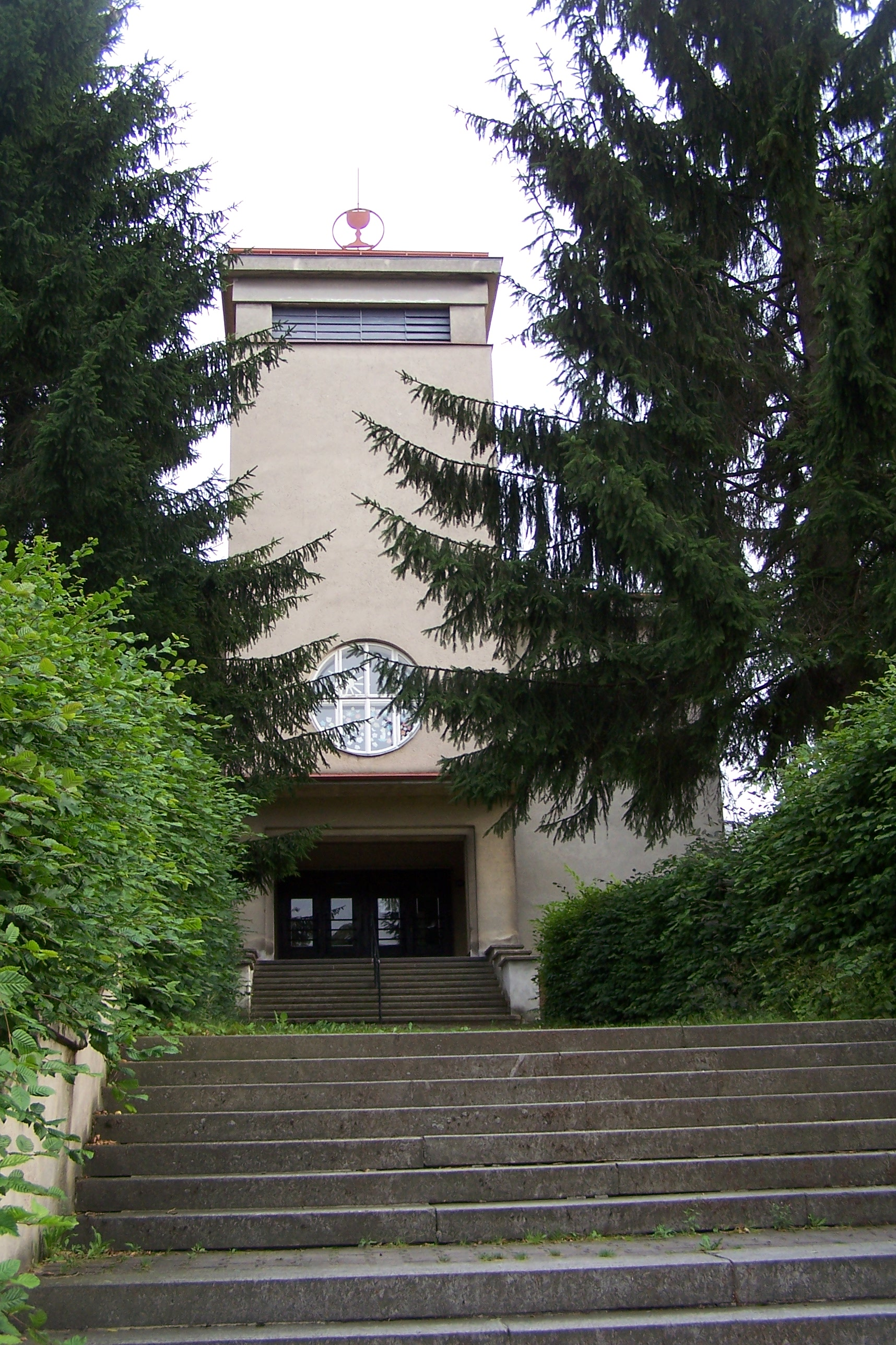 Polička, nábřeží Svobody č. p. 506, kostel Českobratrské církve evangelické.